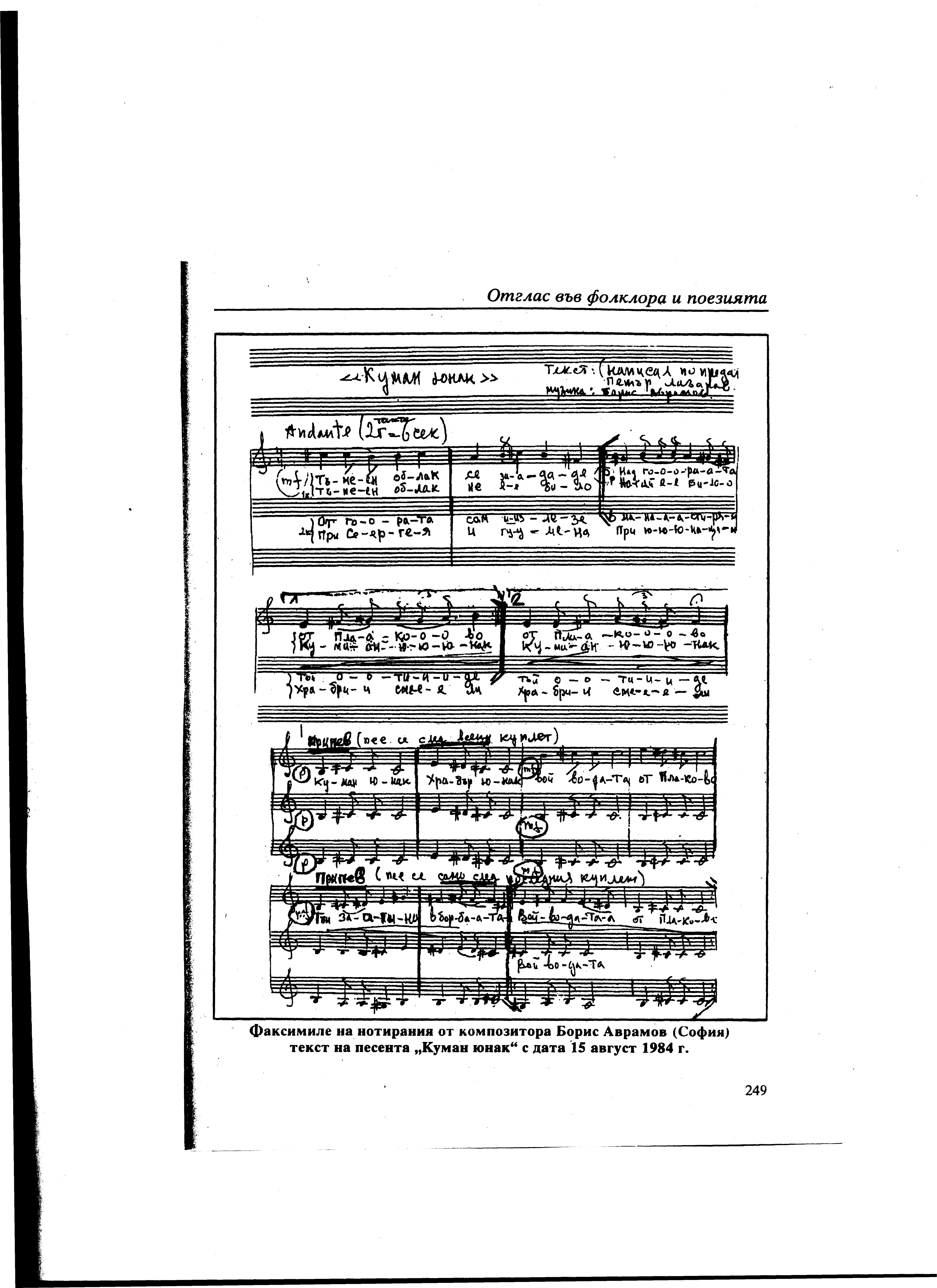 Песен за Куман Войвода - ноти.